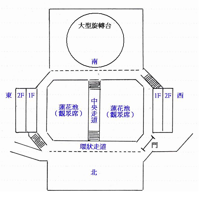 中文（台灣）: 如夢之夢劇場方位示意圖